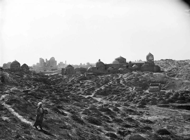 Из Стамбула в Ташкент: Фотопленки Поля Надара (1890). Часть 12. Самарканд